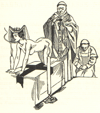 Dessins de Martin van Maële. Illustration de La sorcière, de Jules Michelet. 1911.